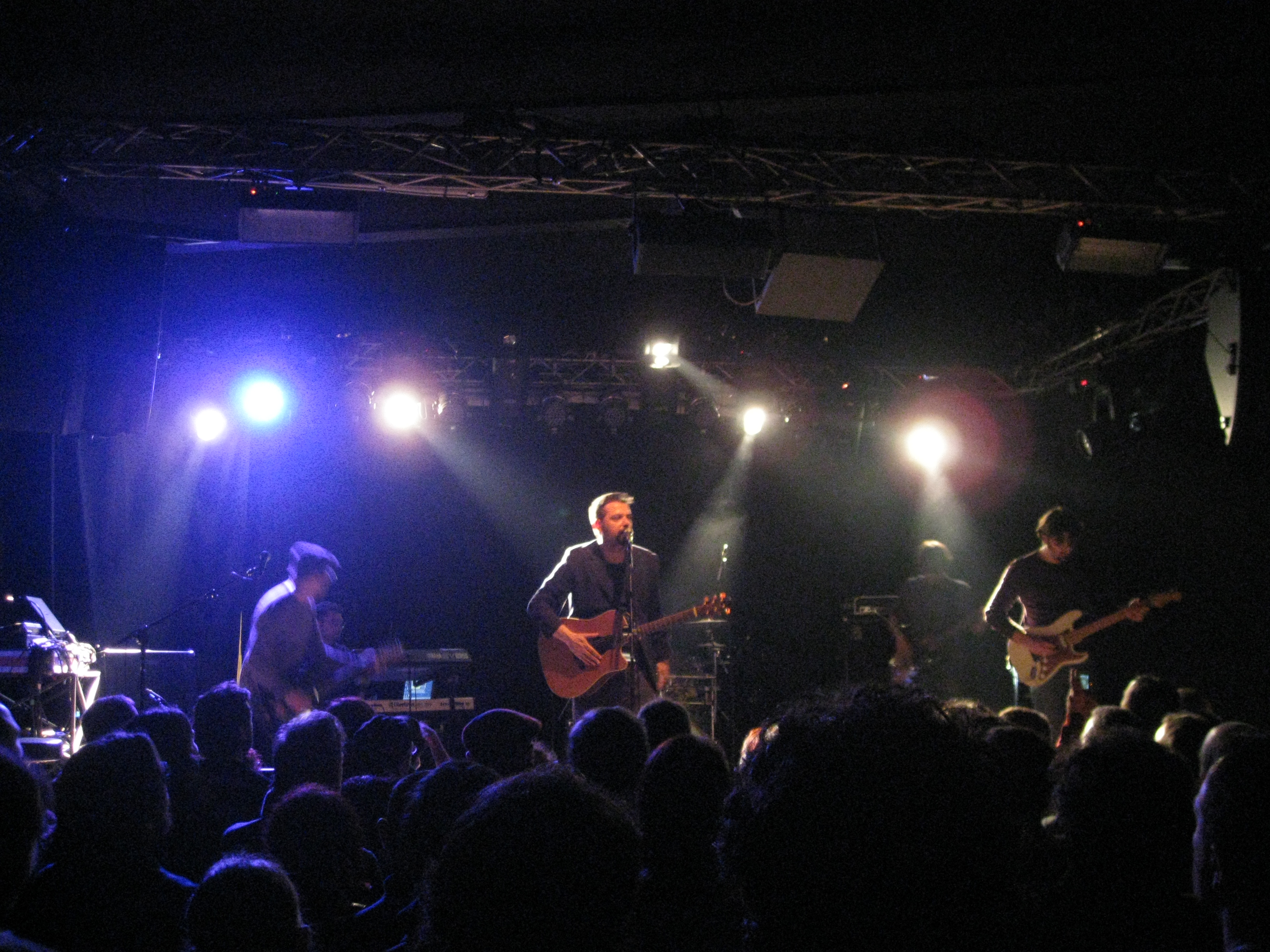 Virginiana Miller in concerto, Circolo degli artisti, Roma, 19 Marzo 2010